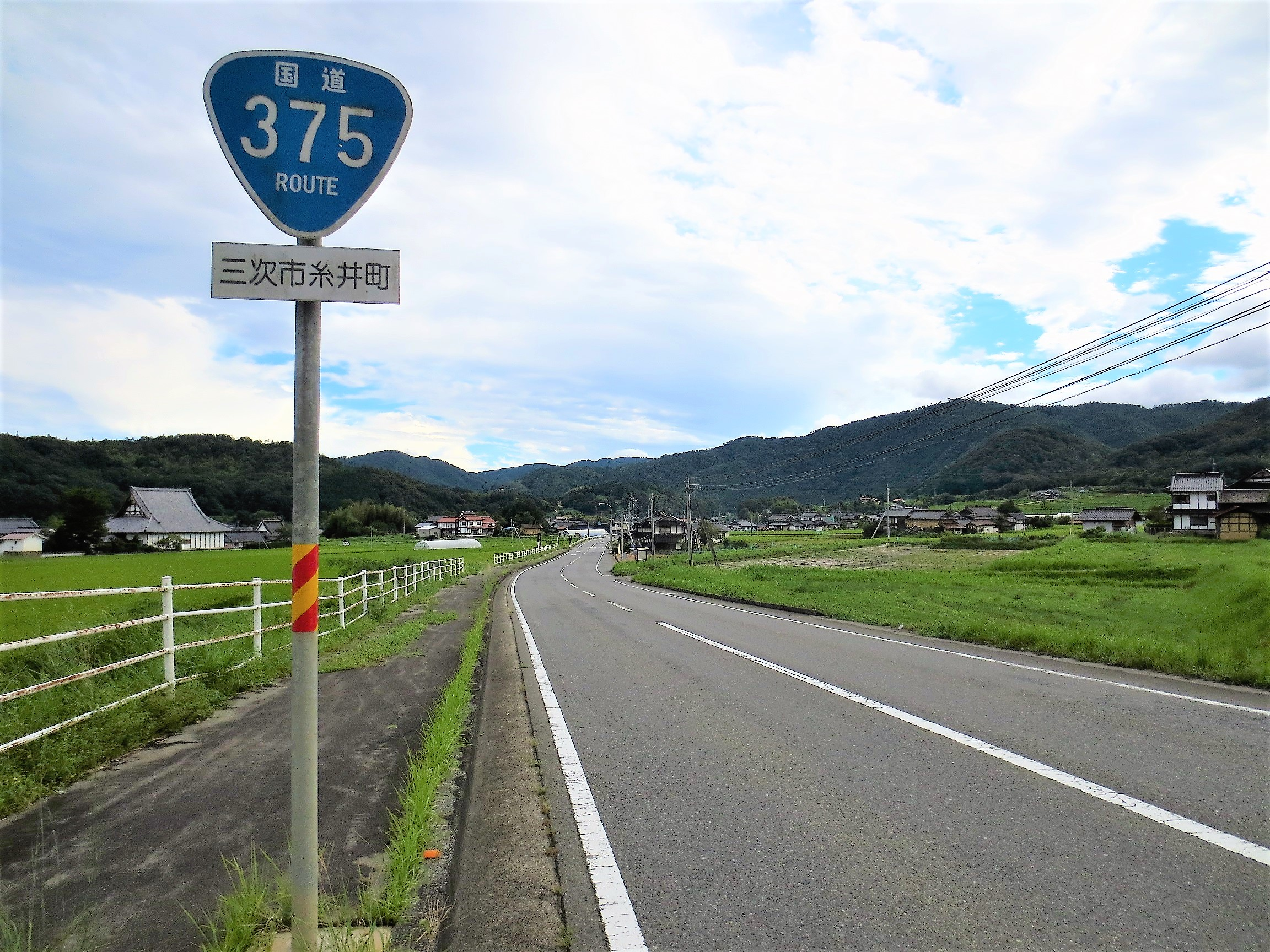 三次市糸井町付近の国道375号。